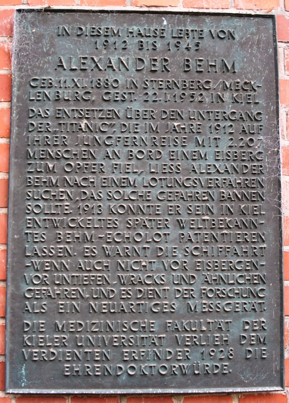 Behm,_Alexander_-_Gedenktafel_in_Kiel - Hardenbergstr. 31